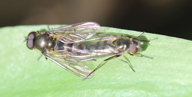 Bärlauch-Erzschwebfliege (Cheilosia fasciata) bei der Paarung, am 21. März 2019 nahe Walldorf/Baden